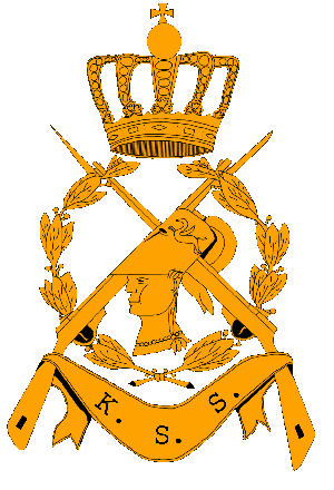 Wapen KSS